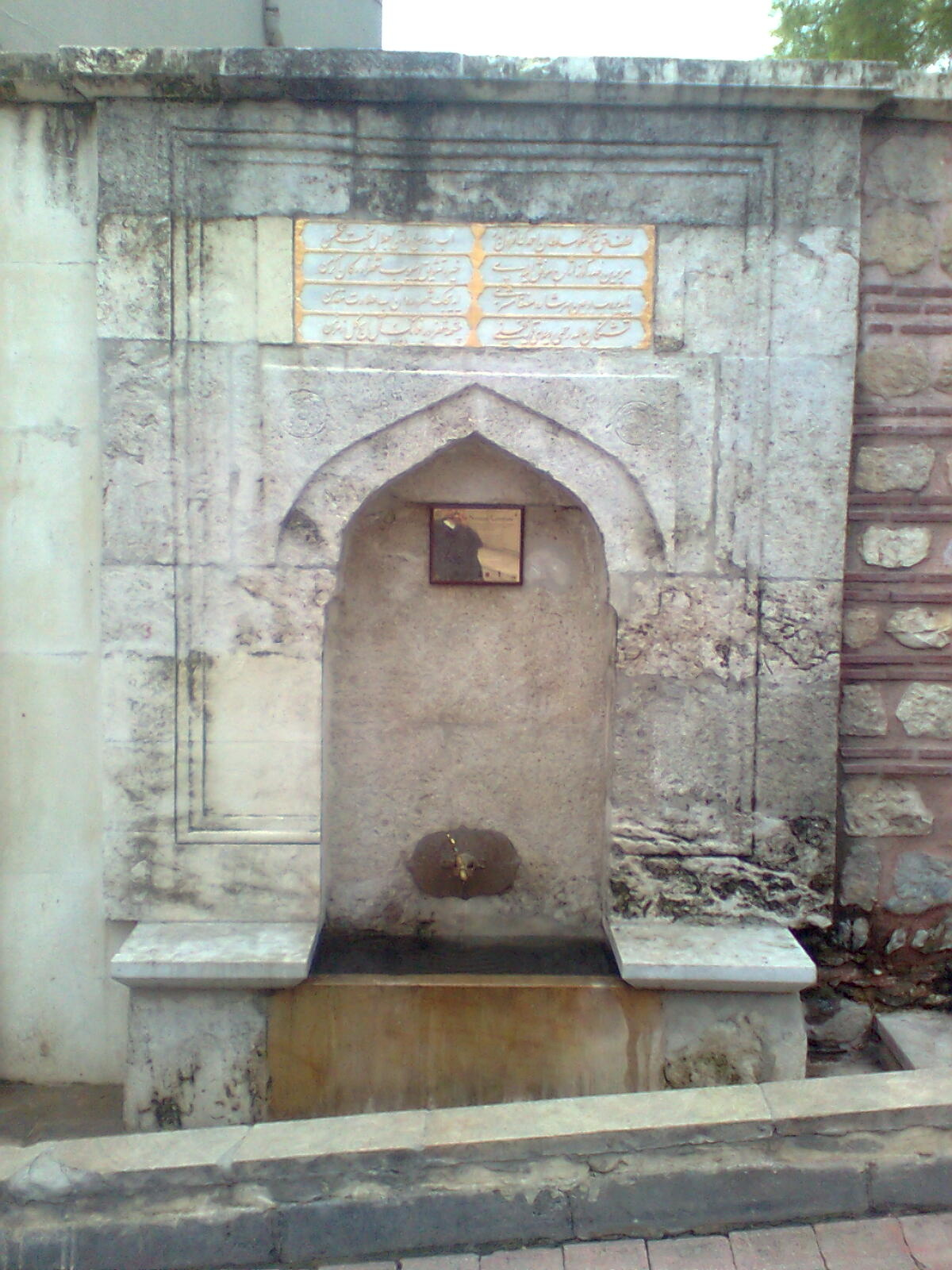 Şehzade Numan Çeşmesi, 1728 yılında III. Ahmet'in oğlu Şehzade Numan tarafından yaptırılmıştır.